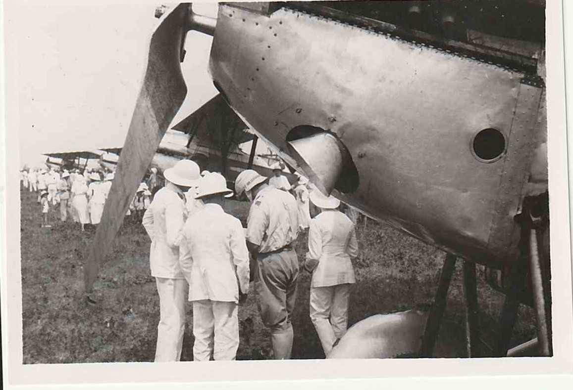 Cette photo a été prise par Maurice Lescanne au Dahomey (Bénin aujourd'hui) en 1932.